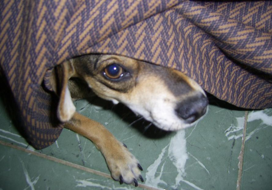 Perra Escondida